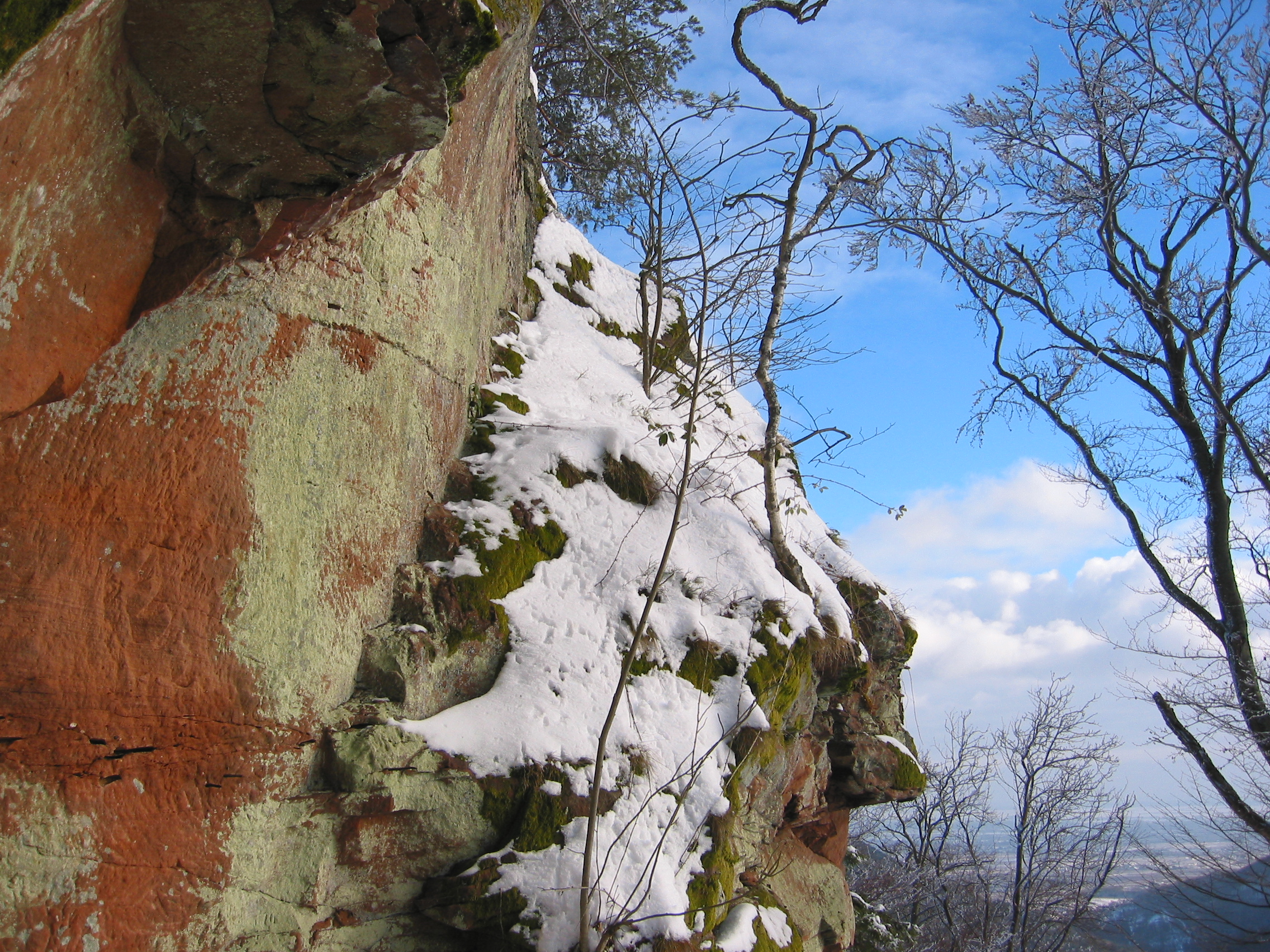 Foto zeitgt den ehemaligen Aufgang zur Oberburg der Frankenburg (Modenbachtal, Pfälzerwald). Die Stufenreste sind am Felsrand zu erkennen.